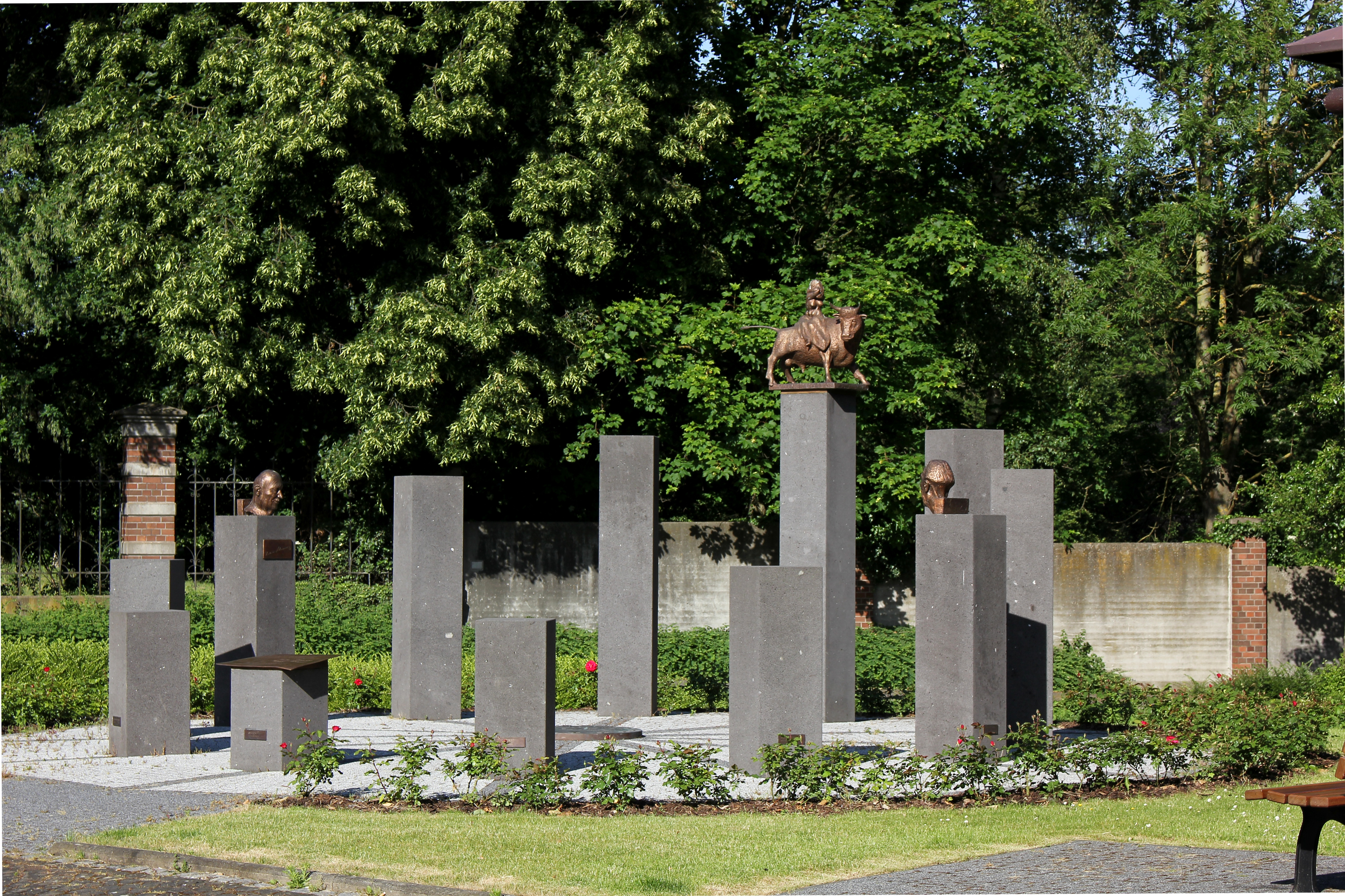 Adenauer-Schuman-Gedenkzeichen von Harald Stieding (* 1940) in Bassenheim, eingeweiht am 17. Juni 2012. Das Denkmal erinnert an das Treffen von Konrad Adenauer und Robert Schuman am 8. Oktober 1948 in der Burg von Bassenheim. Diese Begegnung gilt als Anfang und Grundlage der späteren deutsch-französischen Freundschaft. Die zwölf Stelen auf zwölfeckigem Grund versinnbildlichen die Gesamtheit der europäischen Länder.